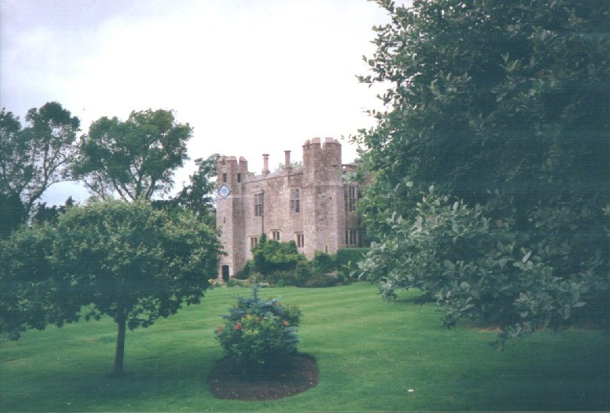 taken c1994